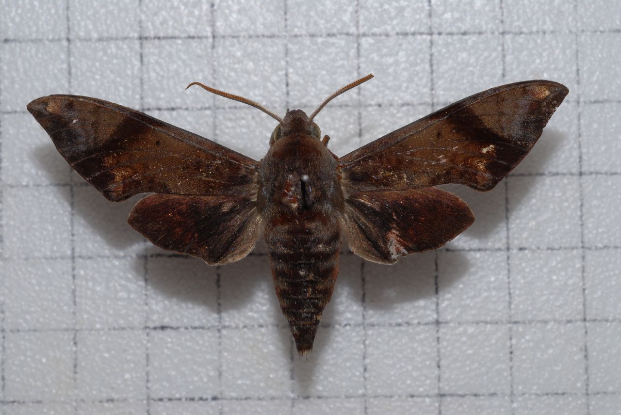 Gehlenia obliquifascia (Hampson, 1910) 灰斑天蛾 認識台灣的昆蟲9:P.223 眉原天蛾 張保信 台灣蛾類圖說一:P.53